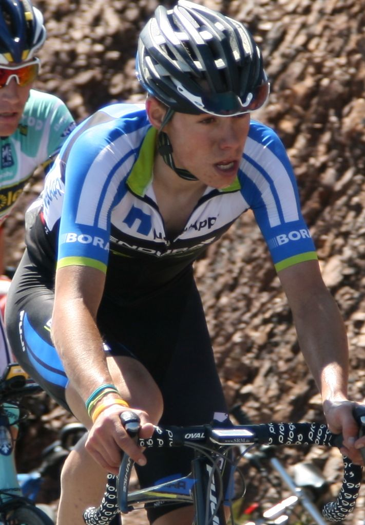 David de la Cruz del equipo NetApp-Endura, subiendo el monte Diablo durante el Tour de California 2013